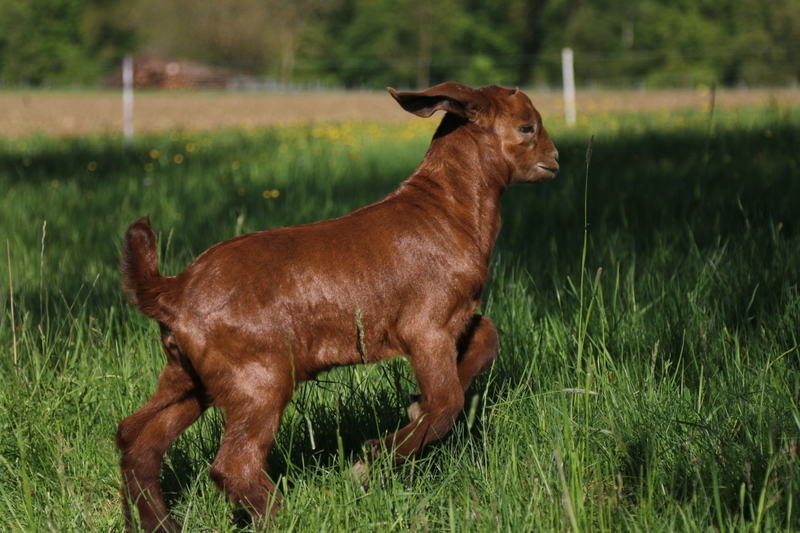 Burenziegenlamm im Farbeinschlag Kalahari Red